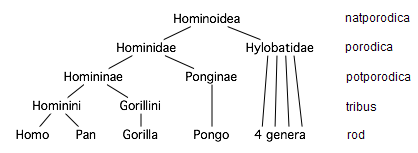 Rodoslovno stablo Hominoidea